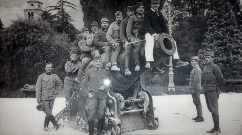 Soldati a cavalcioni su obice 280C in piazza Dante Trento